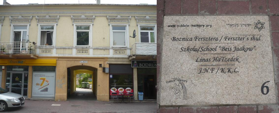 Radomsko. Otwarte Muzeum Żydowskie 6